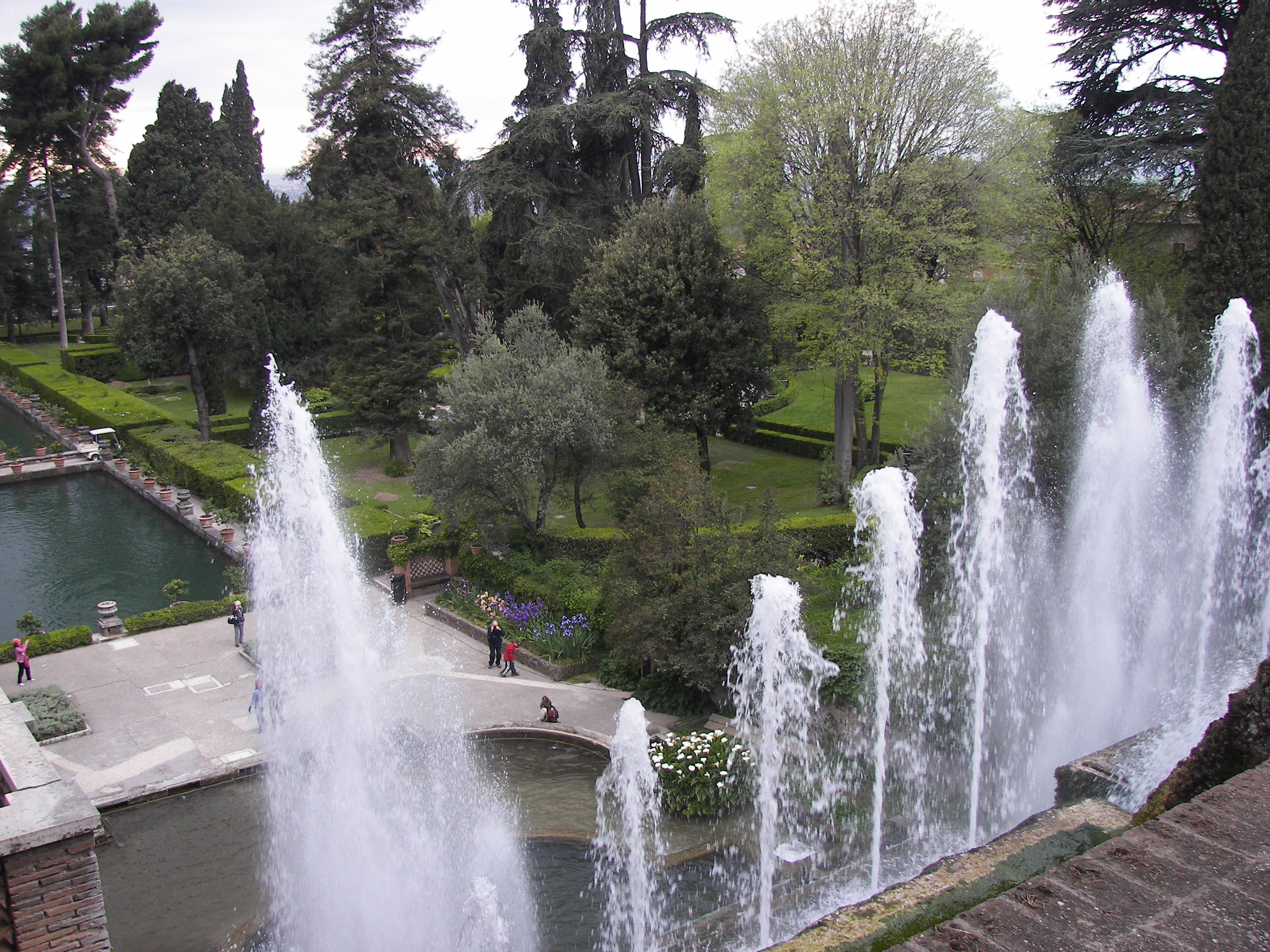 Fountain at Villa d'Este in Tivoli.